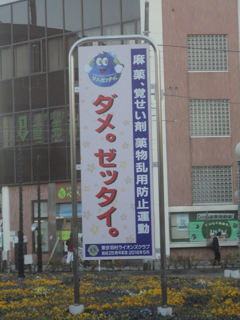 麻薬・覚せい剤薬物乱用防止運動「ダメ。ゼッタイ。」看板